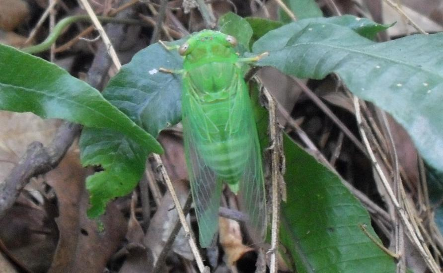 薄翅蟬，學名： Chremistica ochracea，拍攝地點：臺北市木柵公園萃湖旁。